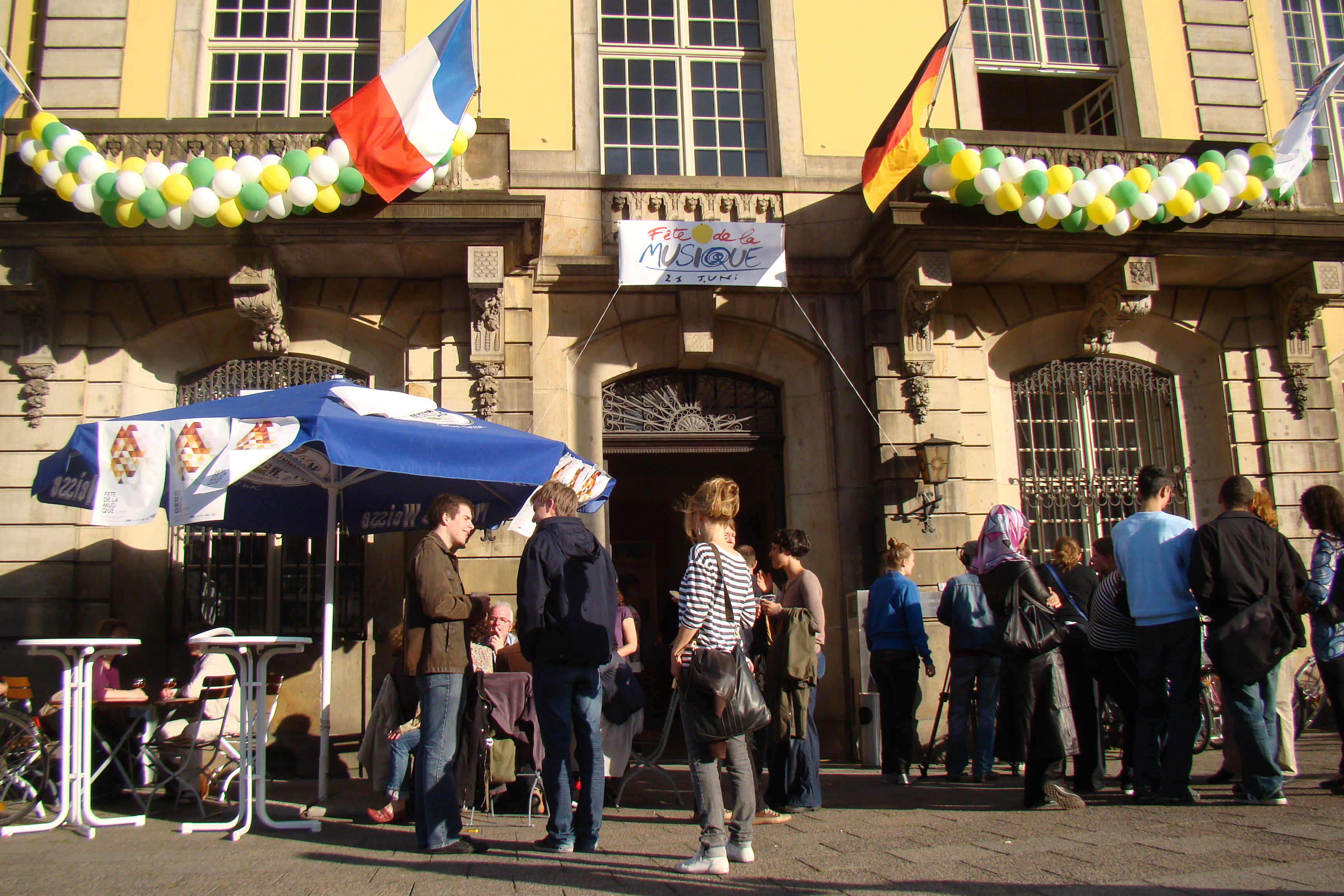 Fête de la musique à l'OFAJ à Berlin.